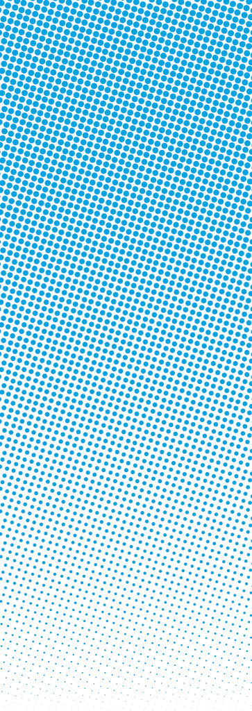 Cyan-Verlauf